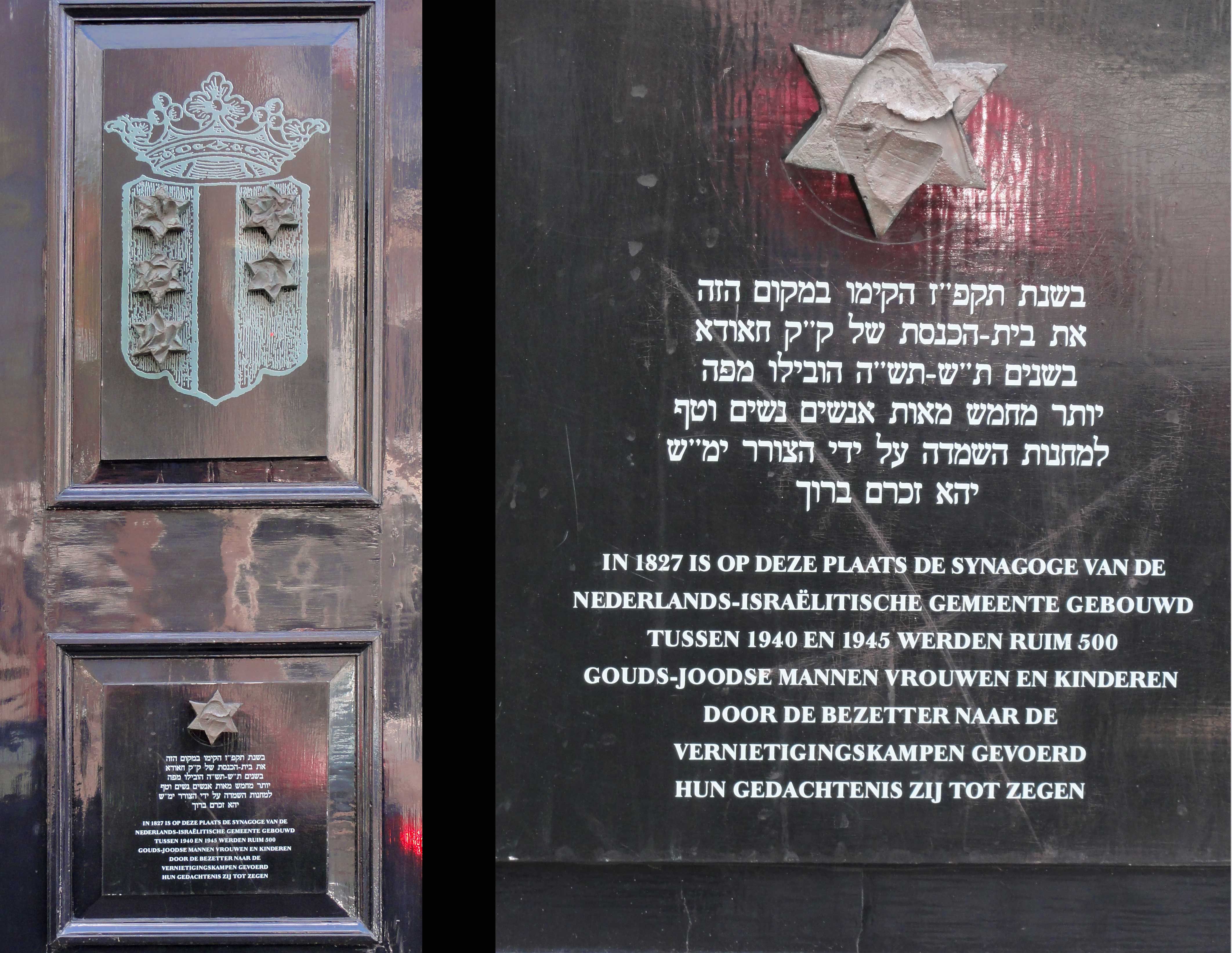 Plaquette op de deur van de voormalige synagoge te Gouda, Turfmarkt 23, gemaakt door Ralph Prins, onthuld in 1996, uit het stadswapen van Gouda is de zesde ster gevallen, als symbool voor de ruim vijfhonderd vermoorde Joden uit Gouda, links het paneel met wapen en tekst, rechts de tekst (vergroot). Prins maakte de plaquette in opdracht van de Stichting Joodse Herinneringsplaquettes.